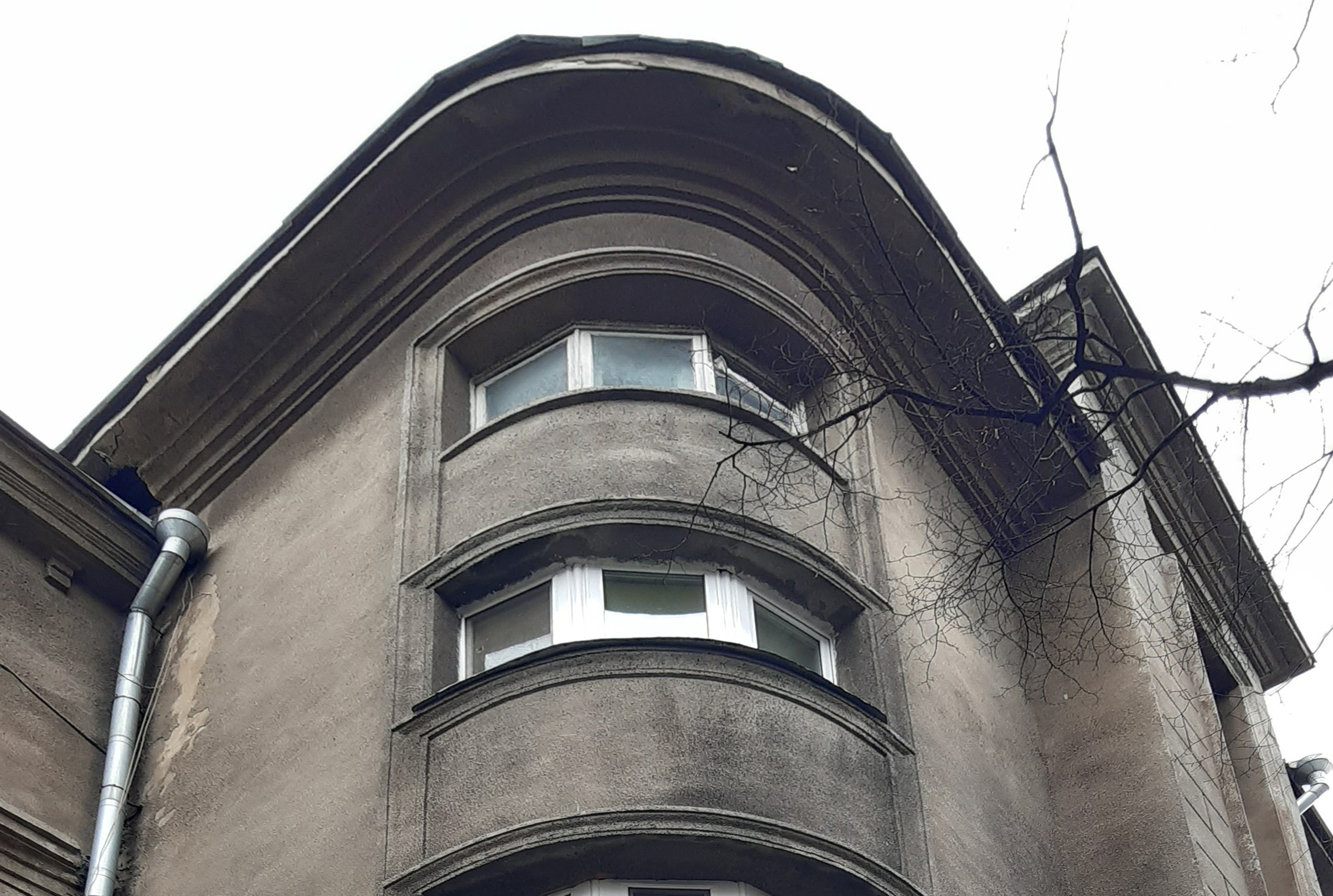 Заокруглені наріжні вікна. Будинок на Інститутській, в якому мешкав А. В. Ніковський, публіцист, лідер партії УДРП (УПСФ), засуджений у справі Спілки визволення України, Київ, Інститутська вул., 22/7